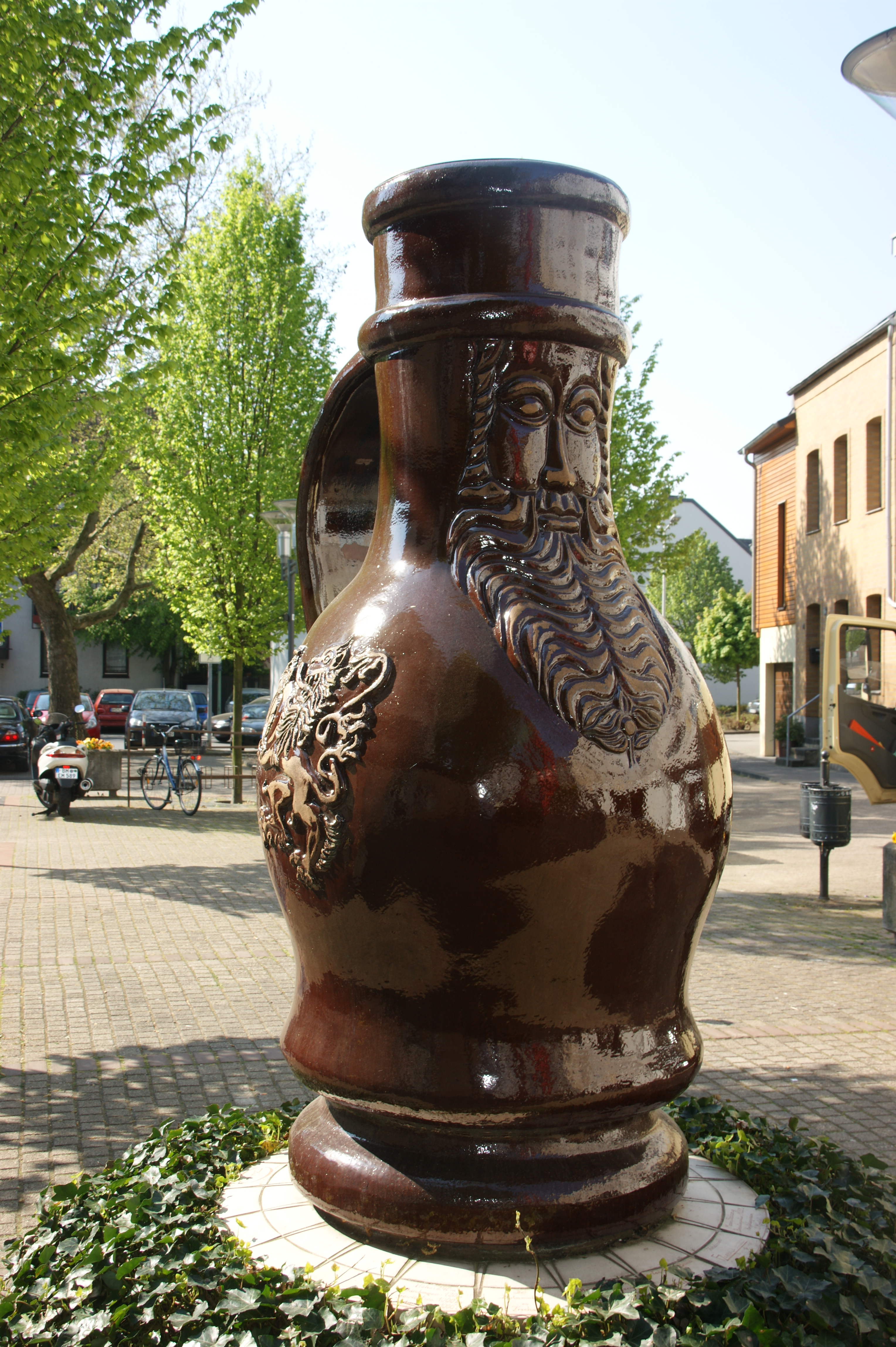 größter Bartmannkrug der Welt in Frechen, Sternengasse: Im Jahre 2001 ist dieser Krug von dem ortsansässigen Keramikmeister Manfred Zimmermann in Zusammenarbeit mit dem Frechener Bildhauer Manfred Holz hergestellt worden und der Stadt Frechen zum 50. Stadtgeburtstag geschenkt worden. 2,40 m hoch, 1 Tonne schwer mit einem Fassungsvermögen von rund 1000 Litern